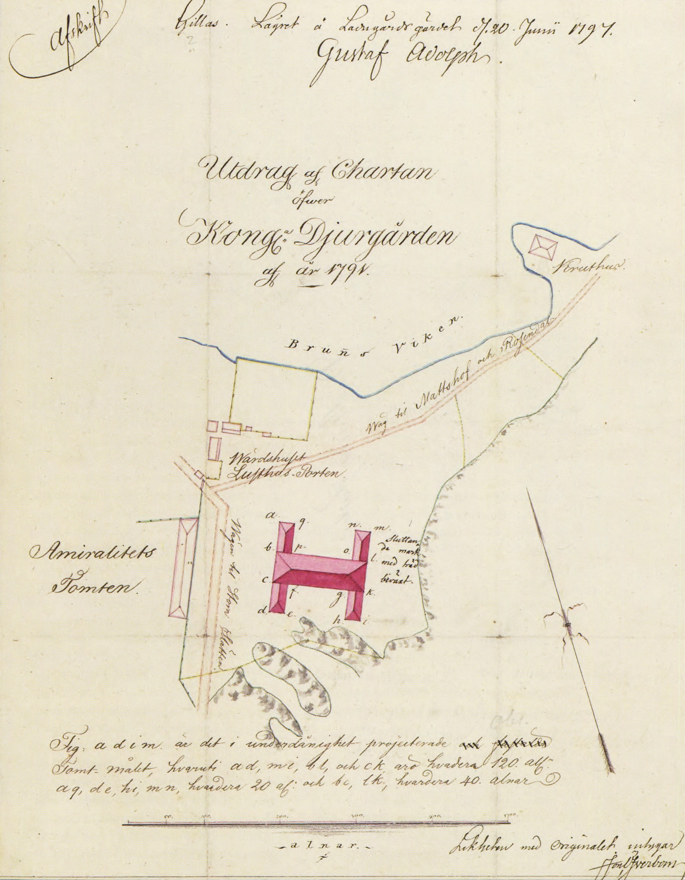 Lusthusporten och Djurgårdsteatern